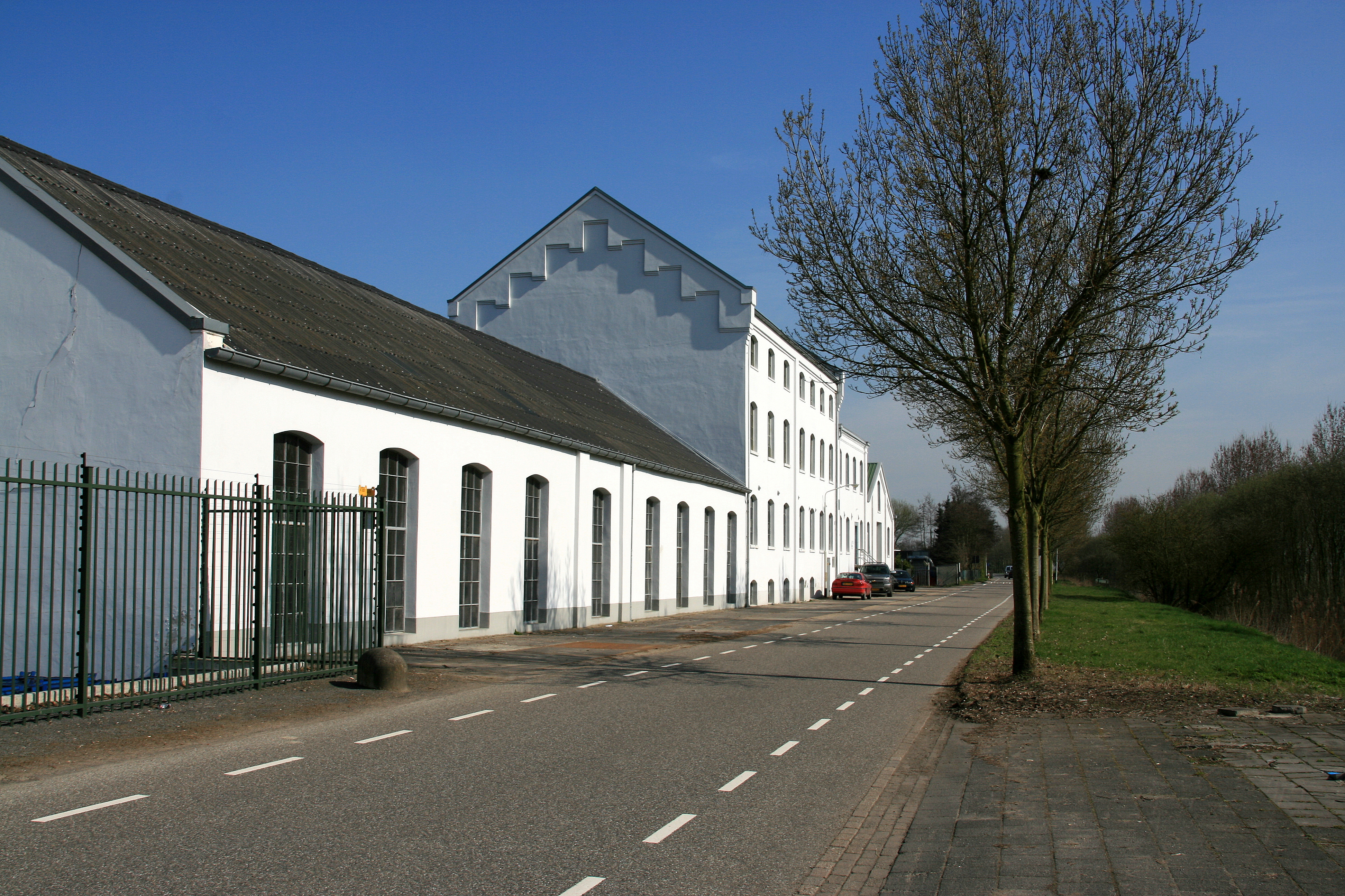 Oud Gastel - St. Antoinedijk 13 - Voormalige suikerfabriek St. Antoine